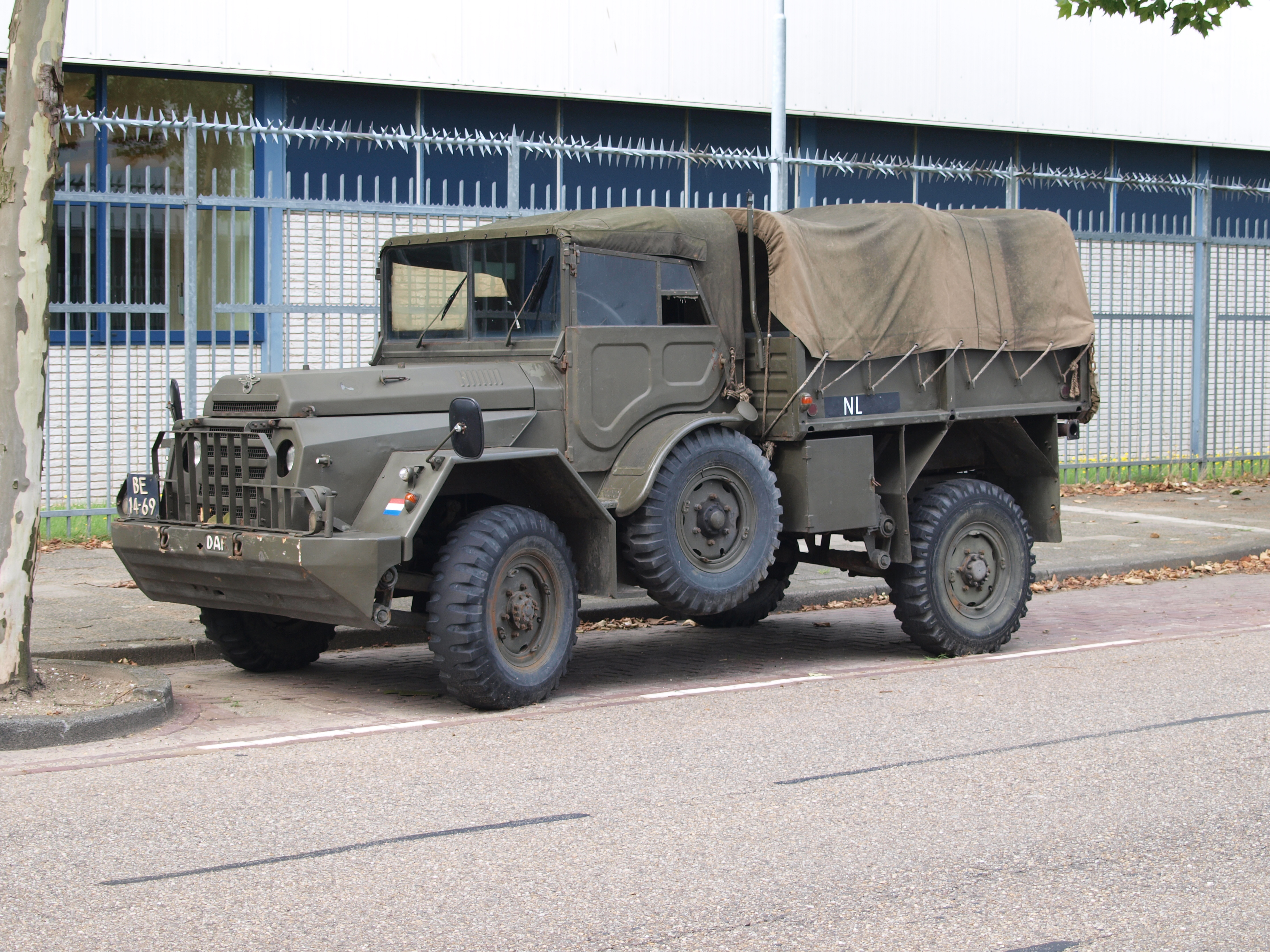 DAF YA 126 at Haarlem